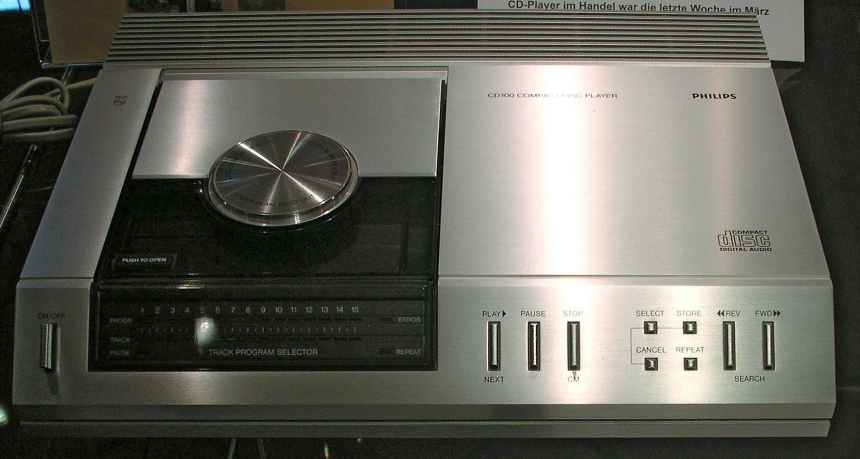 Der legendäre Philips CD 100, Baujahr 1983, Preis damals 2000 DM